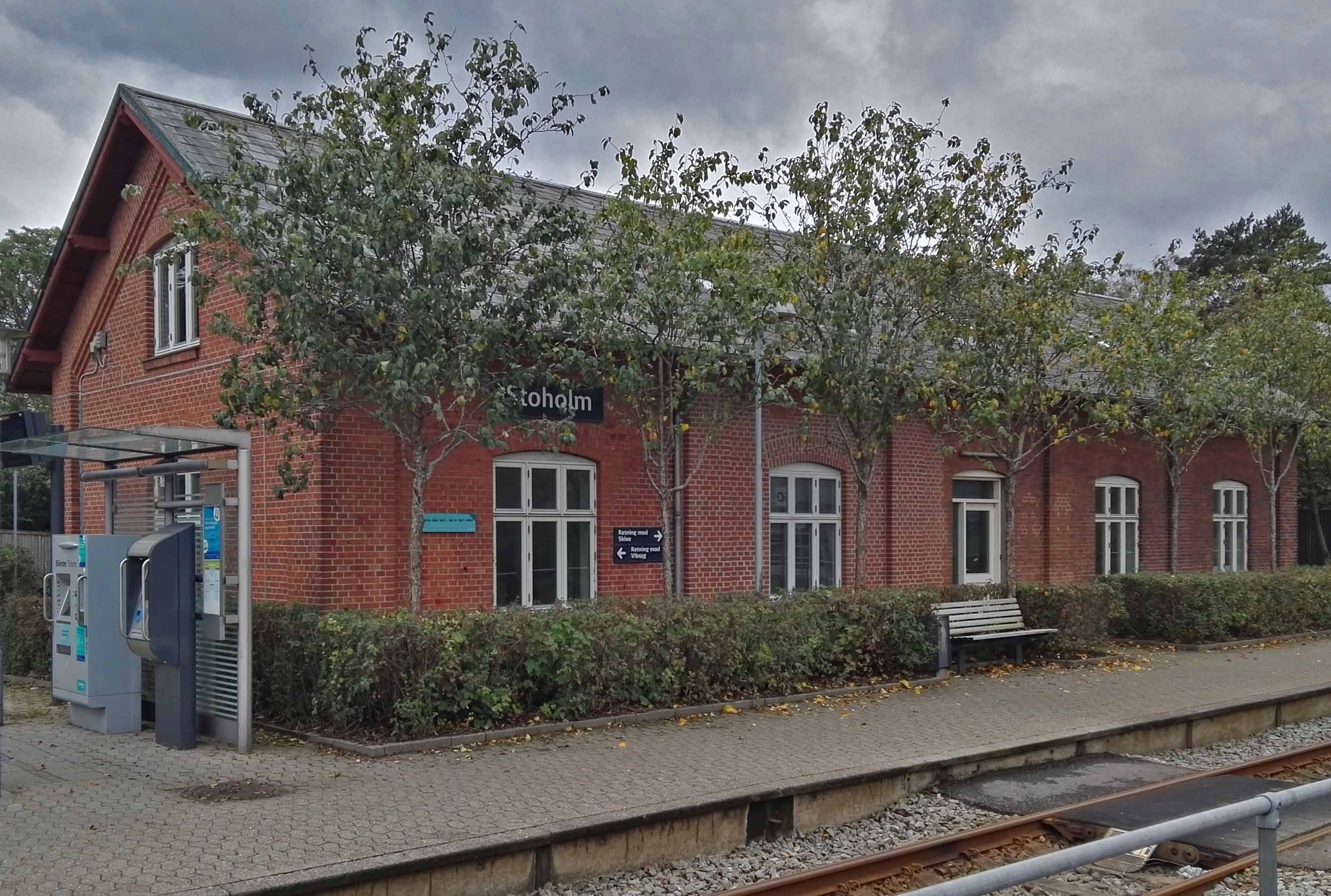 Stoholm Station